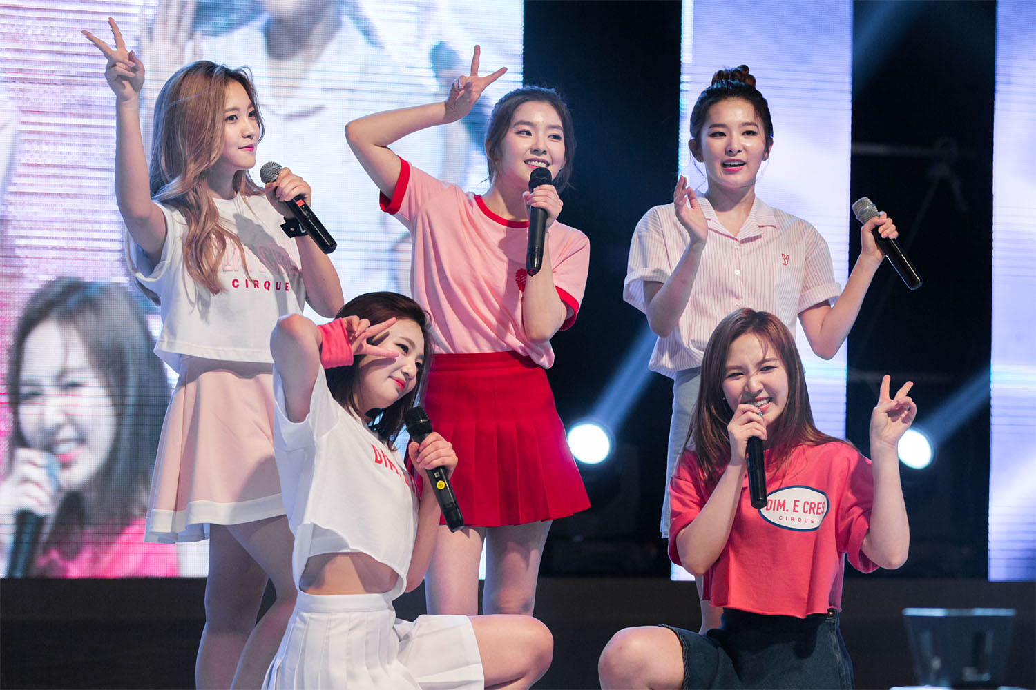 160519 한밭대학교 축제 - 레드벨벳